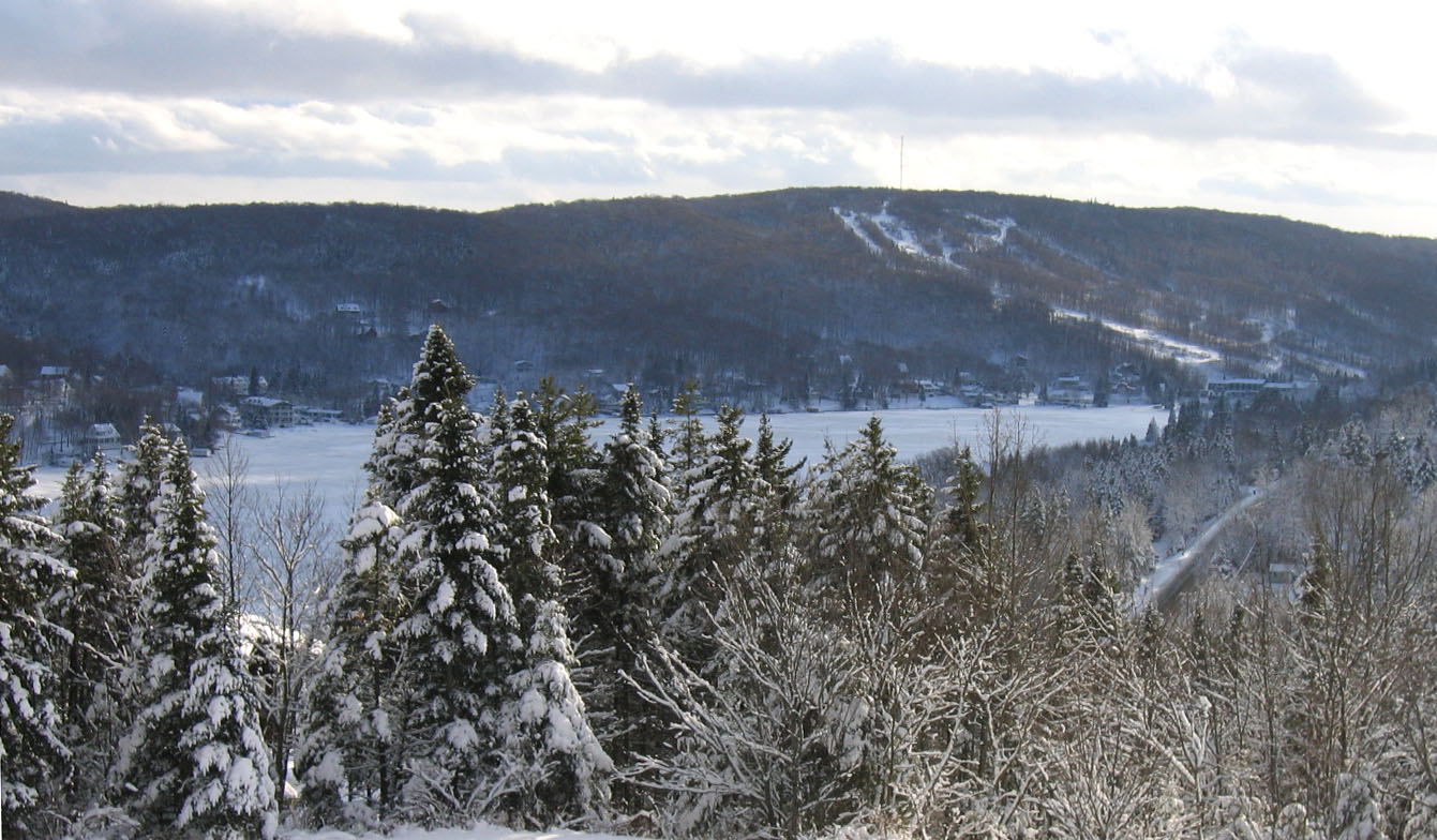 Municipalité de Lac-Beauport, Québec, Canada